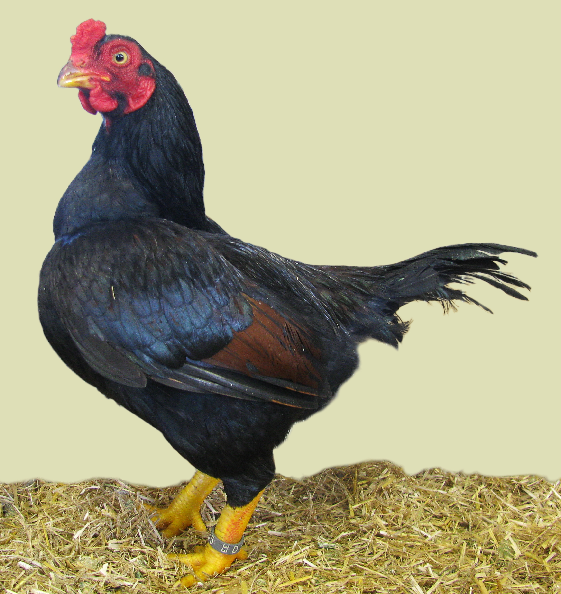 RGZV Frankenthal e.V. – Lokalschau in der Turnhalle Frankenthal vom 22. bis 23. November 2014 1,0 Indische Zwerg-Kämpfer, fasanenbraun, hv96